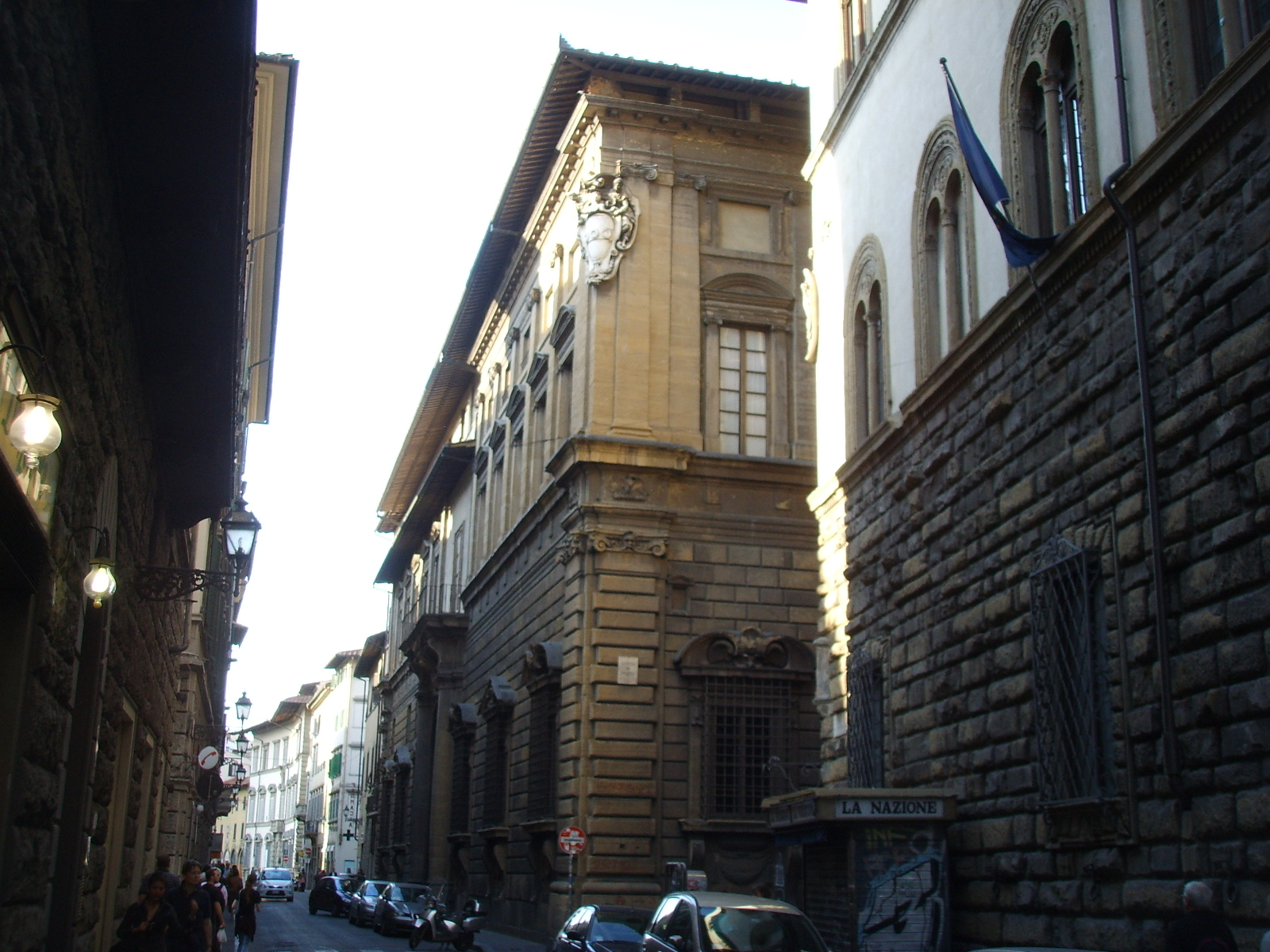 Palazzo nonfinito in via del proconsolo